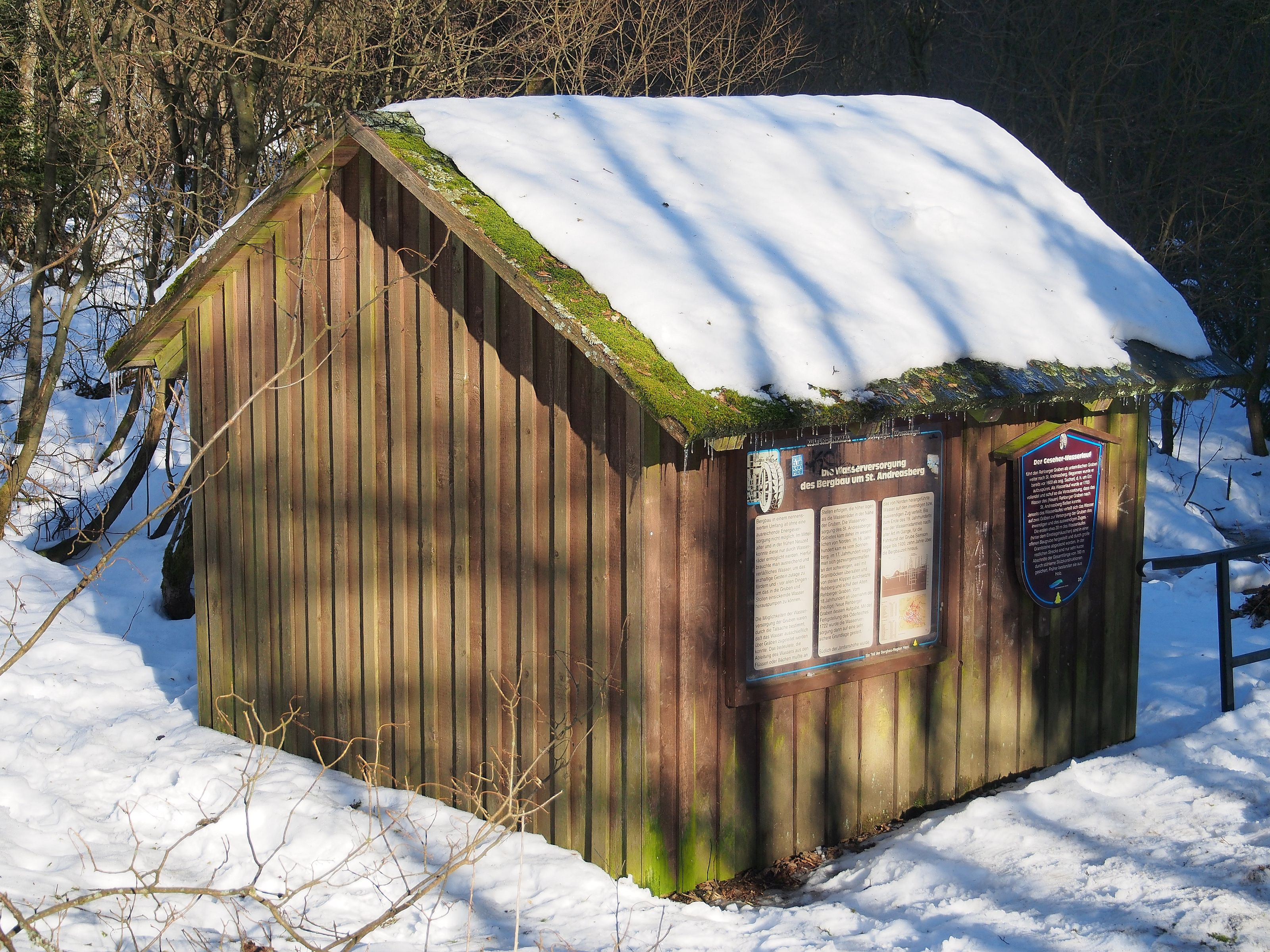 An diesem Häuschen endet der Rehberger Graben. Sein Wasser wird von dort unterirdisch im Geseher-Wasserlauf nach Sankt Andreasberg weitergeführt.